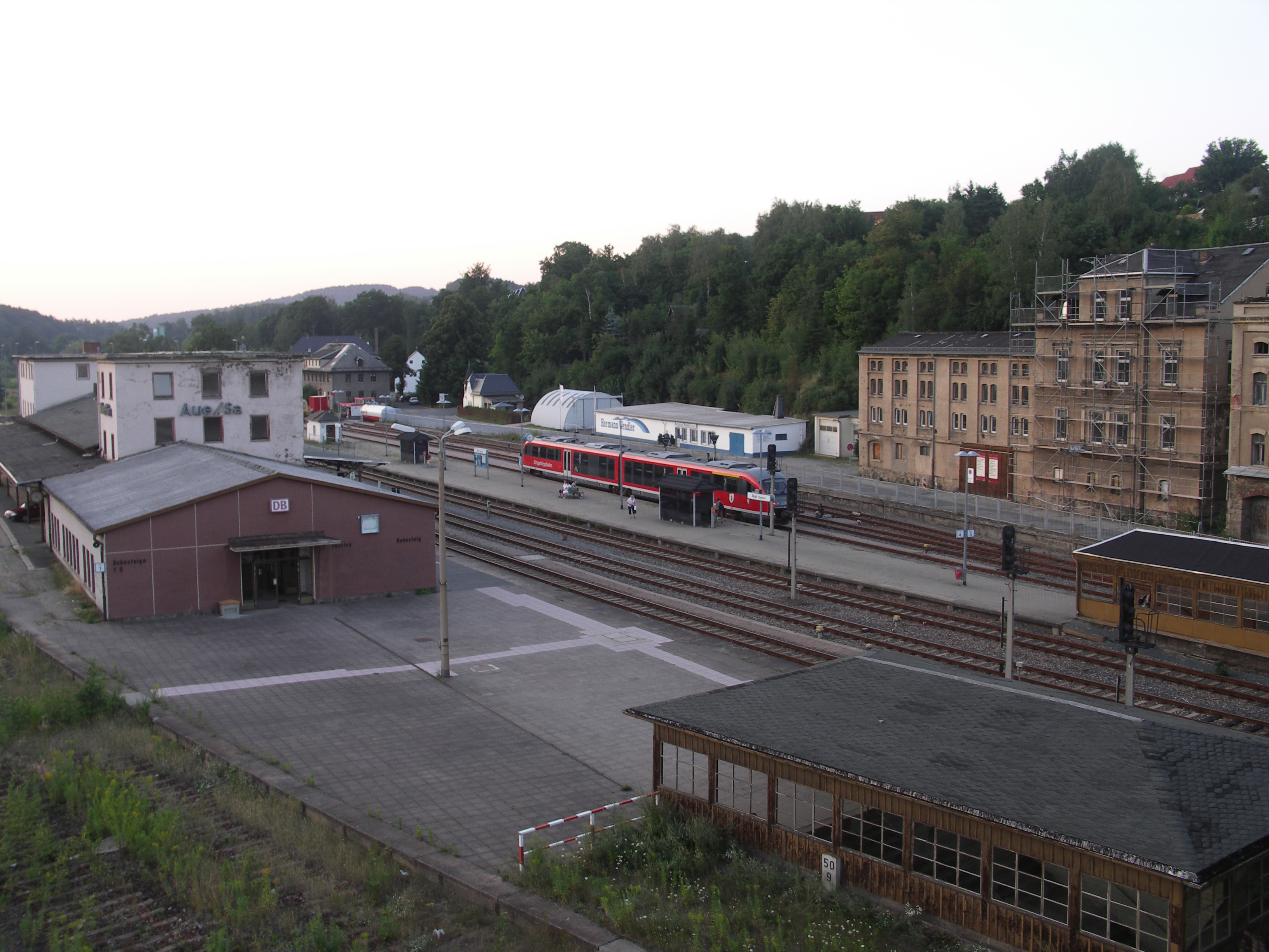 Aue, Bahnhof